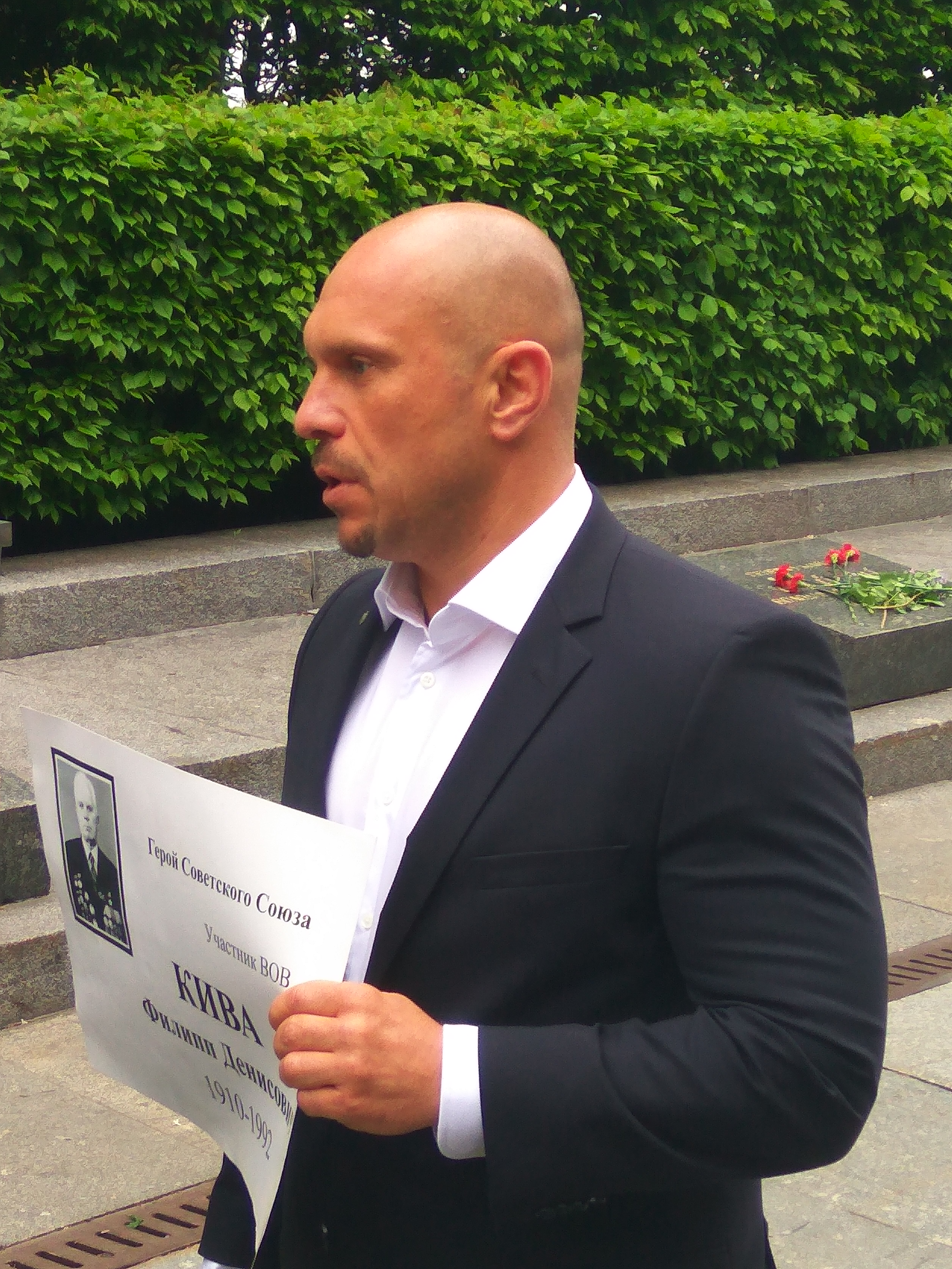 День Перемоги у Києві 2019